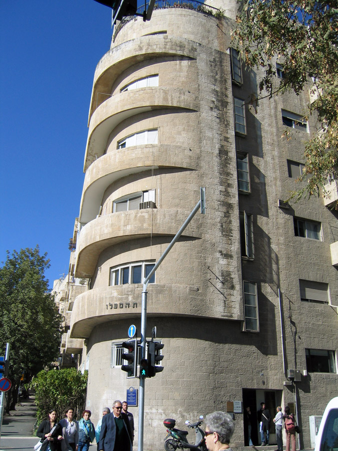 Beit Hamaalot